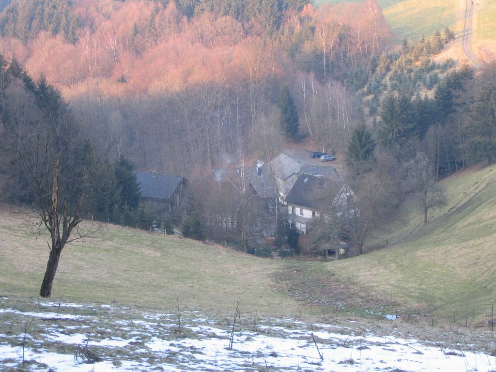 Höh bei Bergneustadt, Ansicht von Süden, Januar 2005